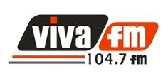 Logo de la radio peruana Viva FM.